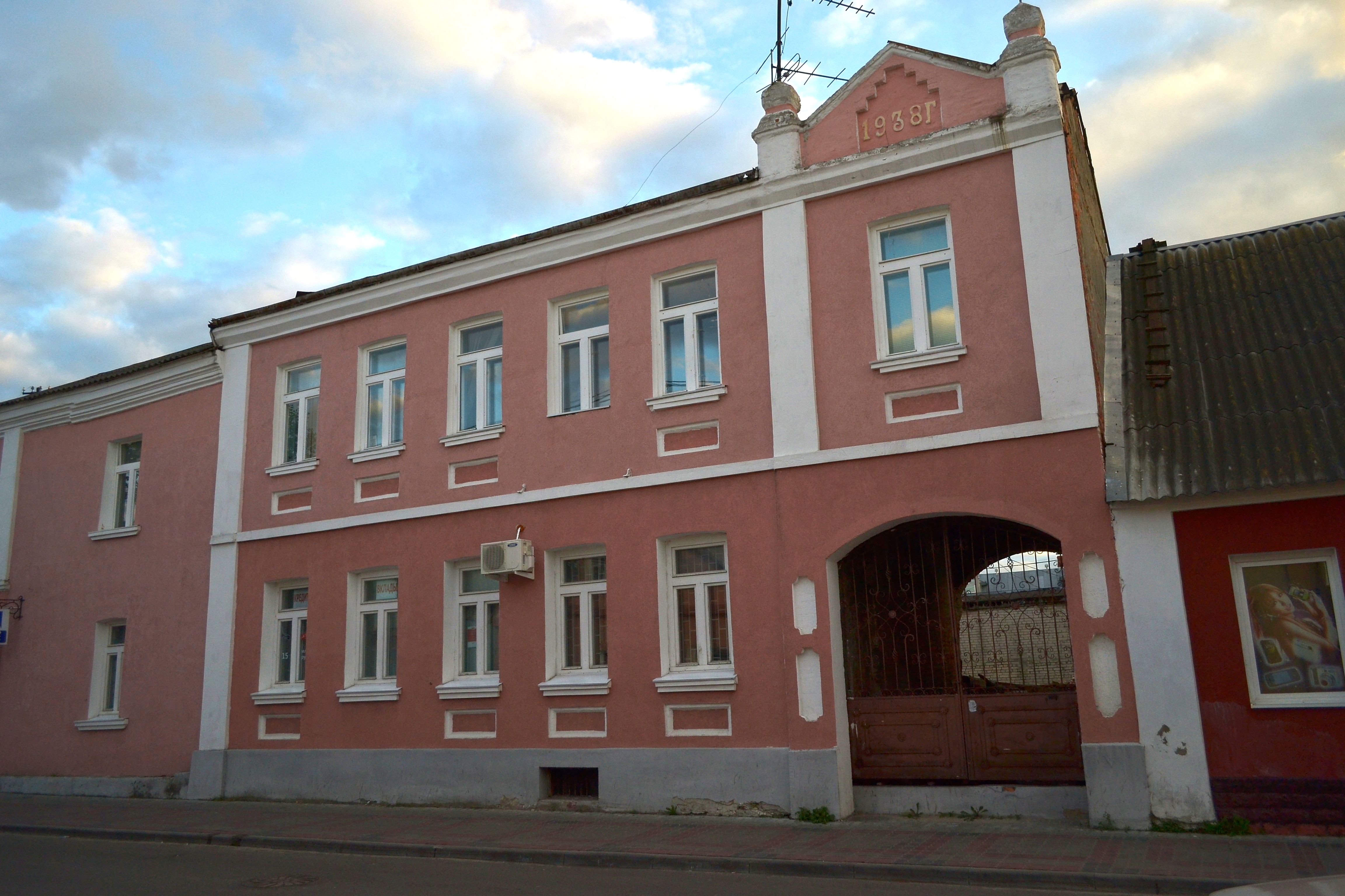 Беларуская (тарашкевіца): Забудова вул. Матросава. г. Кобрынь This is a photo of Belarusian heritage monument. Reference number: 113Г000393 ( WLM)